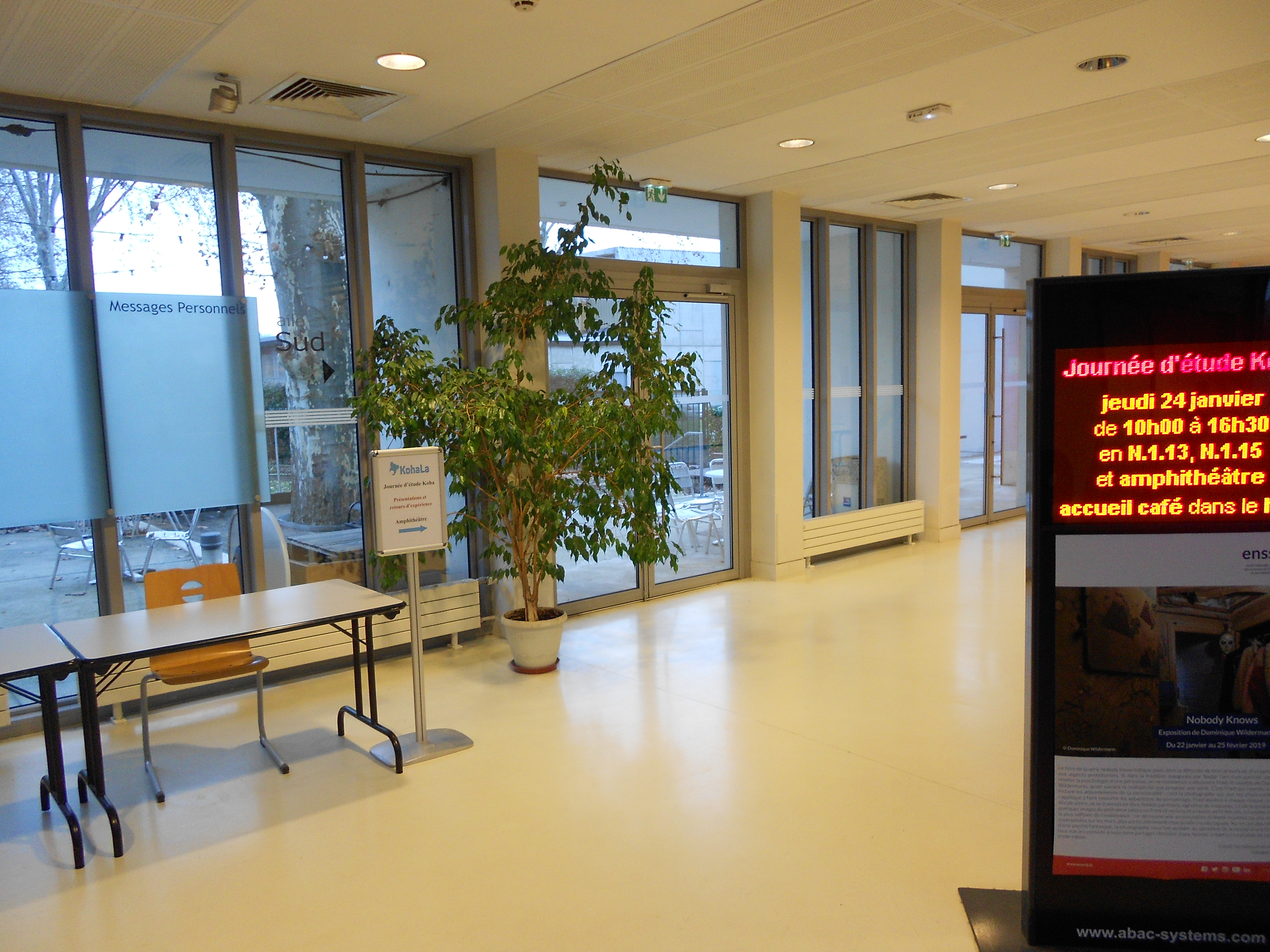 Journée KohaLa à l'Enssib, Villeurbanne. 2019-01-24.